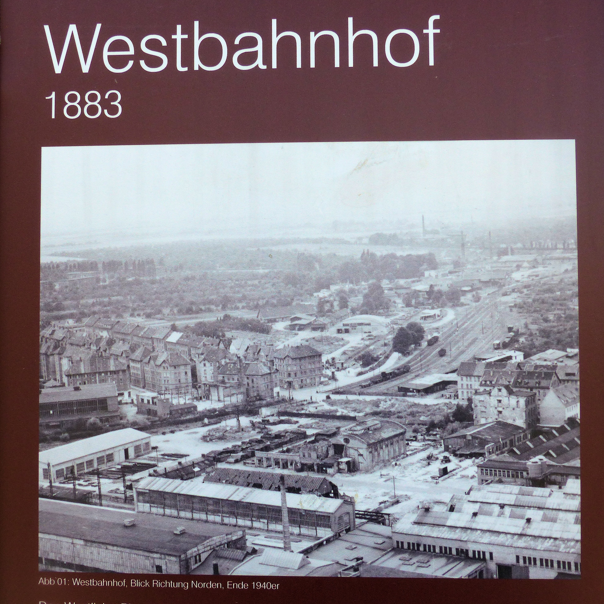 Foto Westbahnhof von 1940 im Container "Westbahnhof/Ringgleis", März 2016, Quelle vermutlich Stadtarchiv Braunschweig